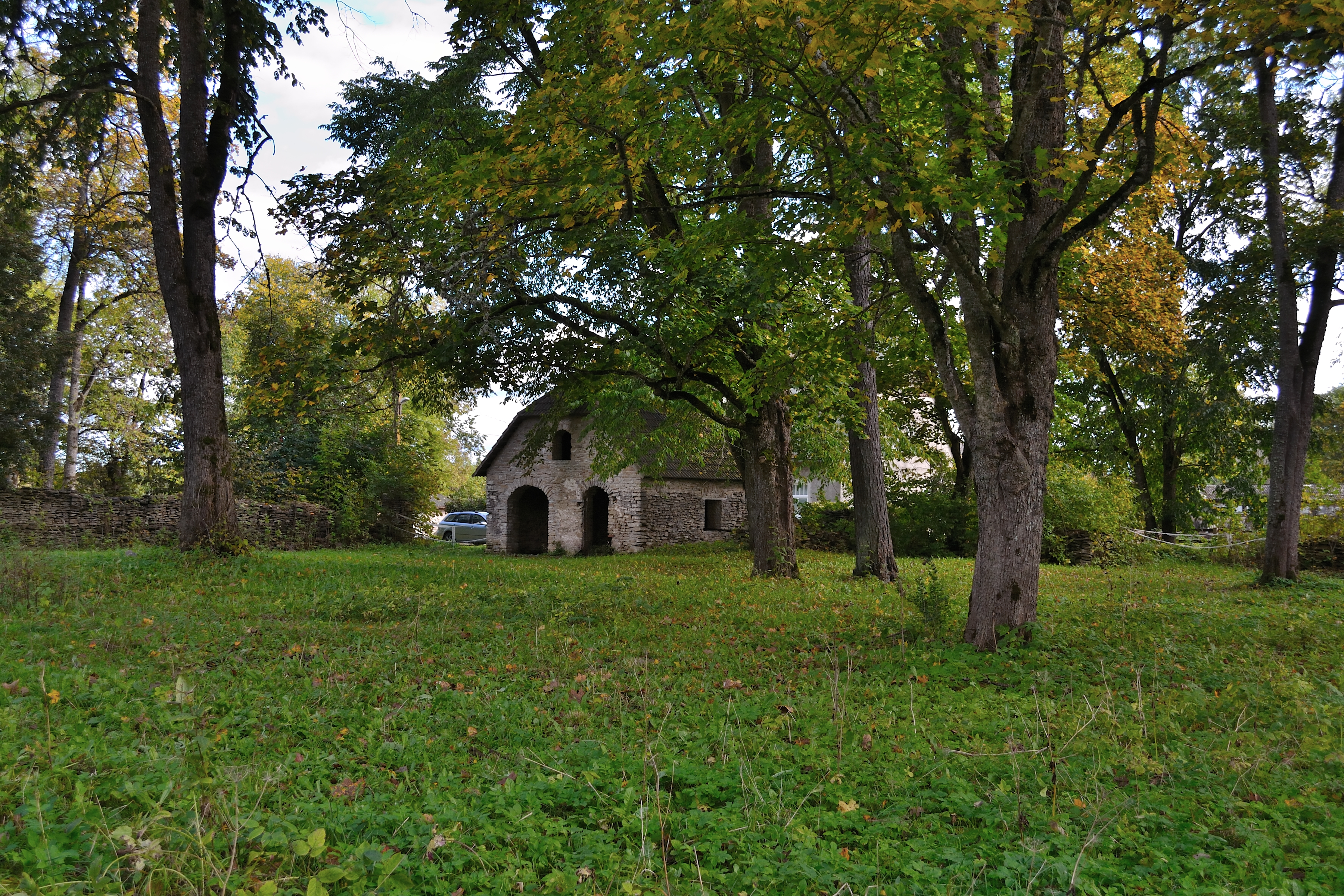 Härgla mõisa park ja allee